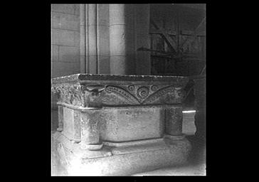 Taufbecken in der Kirche St-Vaast in Saint-Vaast-lès-Mello